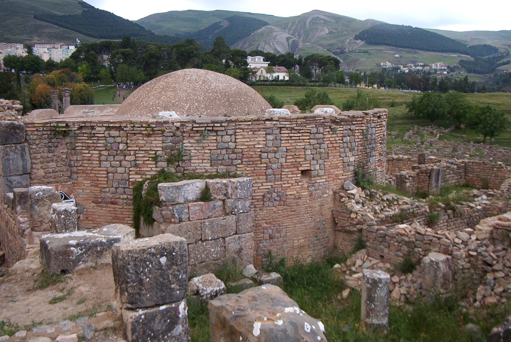 Le baptistère à Djemila